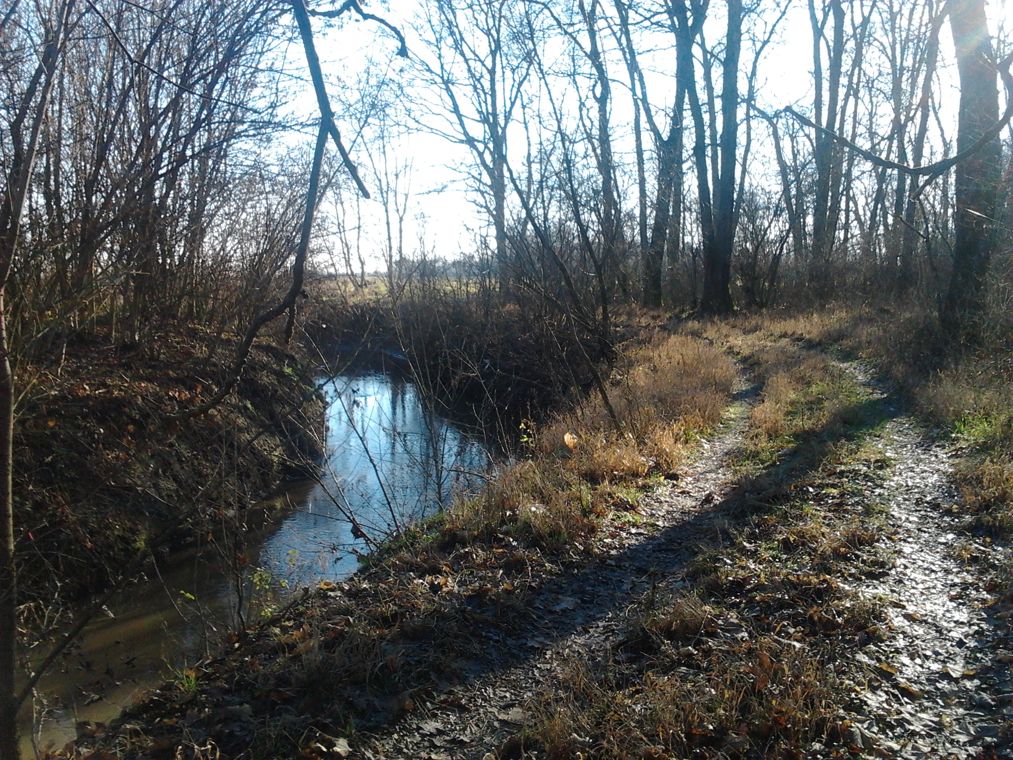 Az Eger-patak Szihalomnál.